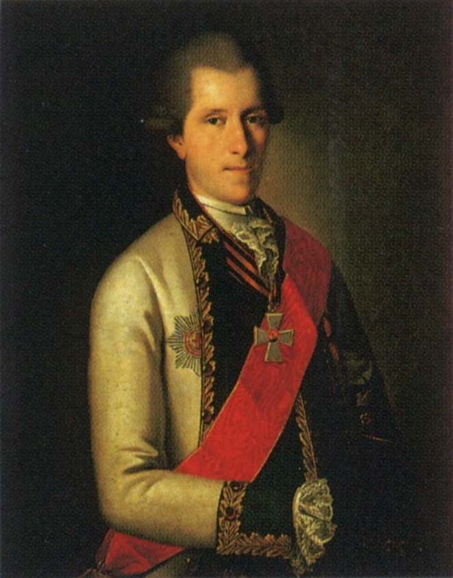 Грейг Самуил Карлович. Русский музей